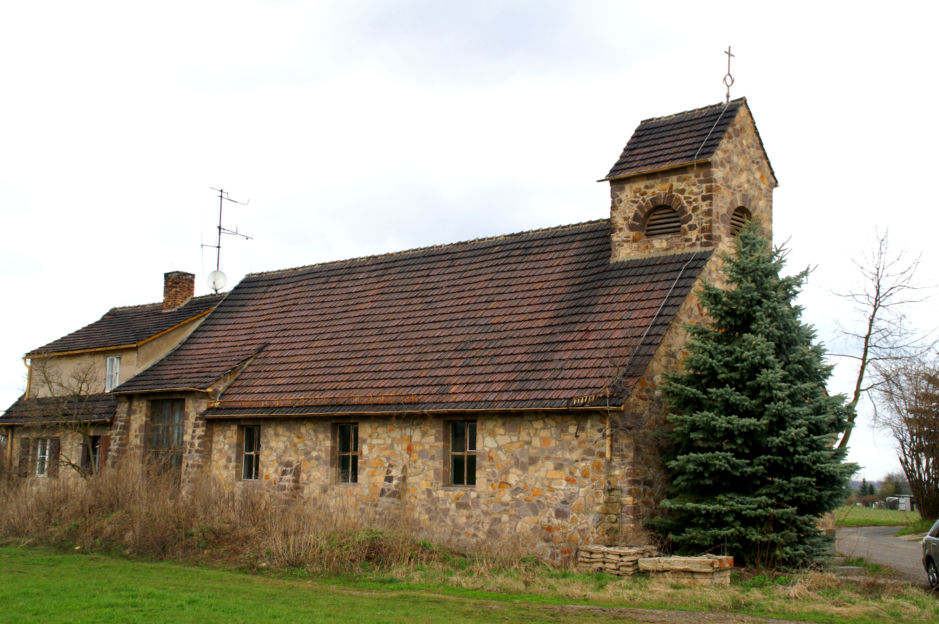 ehemalige katholische Kirche in Serbitz, Thüringen